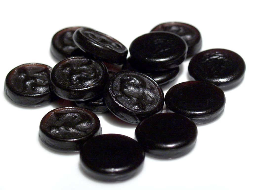 Toms Poletter